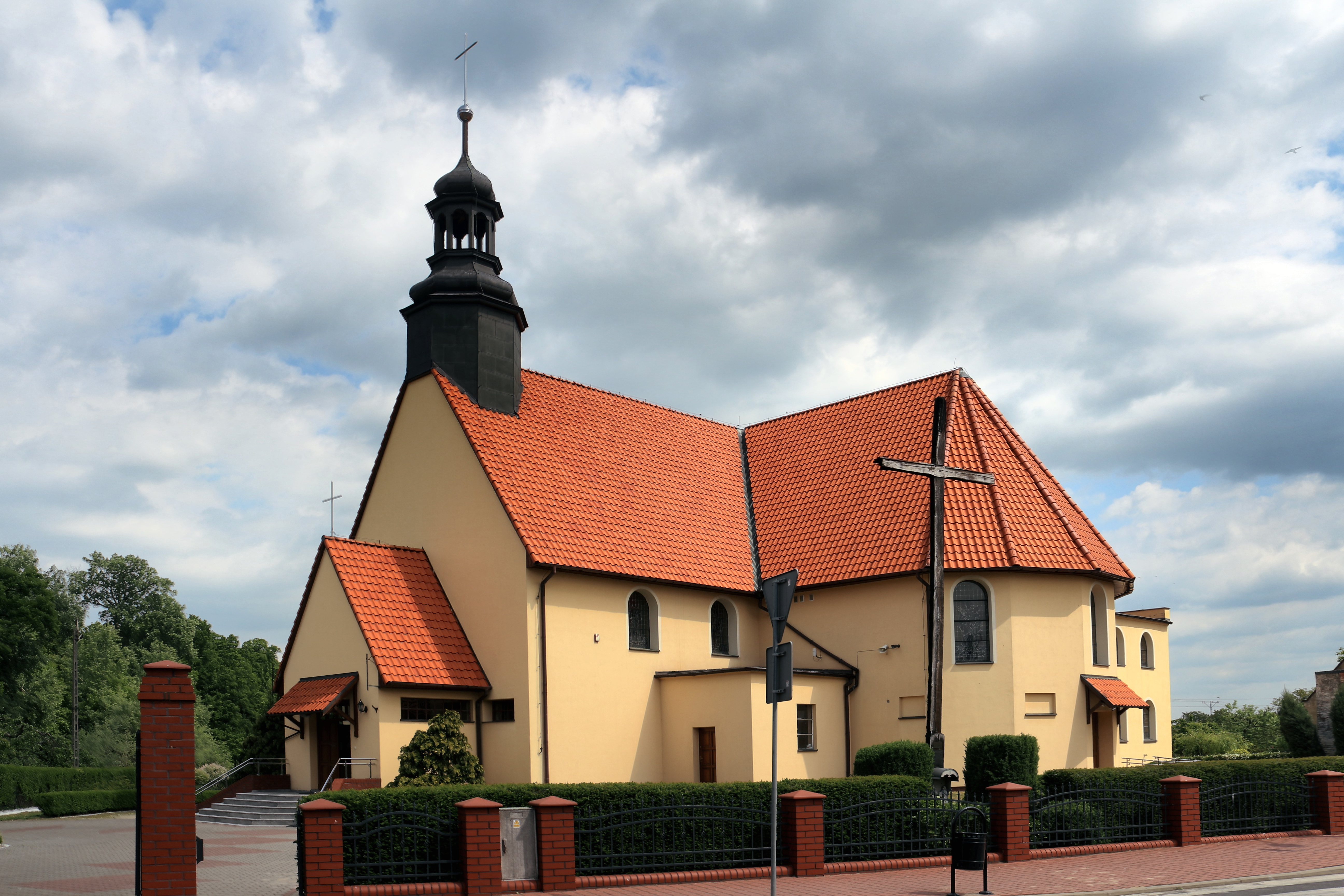 Szlichtyngowa, Rynek 28 - rzymskokatolicki kościół parafialny pw. Podwyższenia Krzyża Świętego, 1996-1999